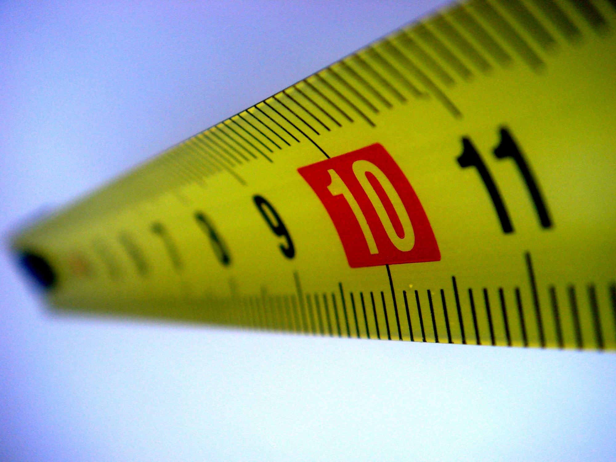 Шкала измерительной рулетки.